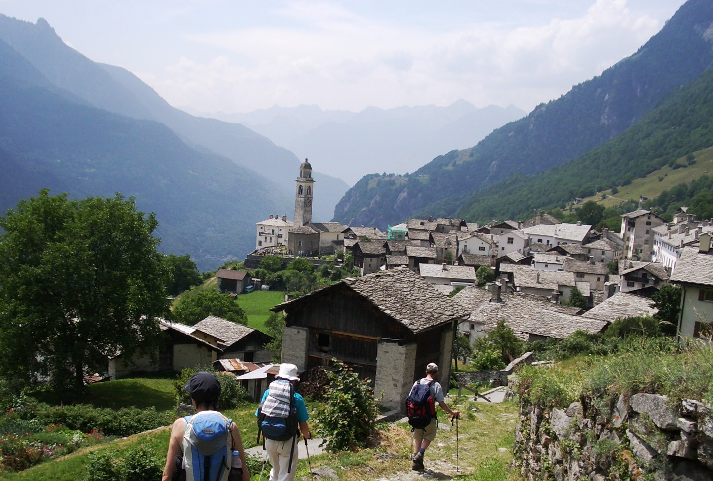 Soglio GR, Switzerland self-made, June 2006